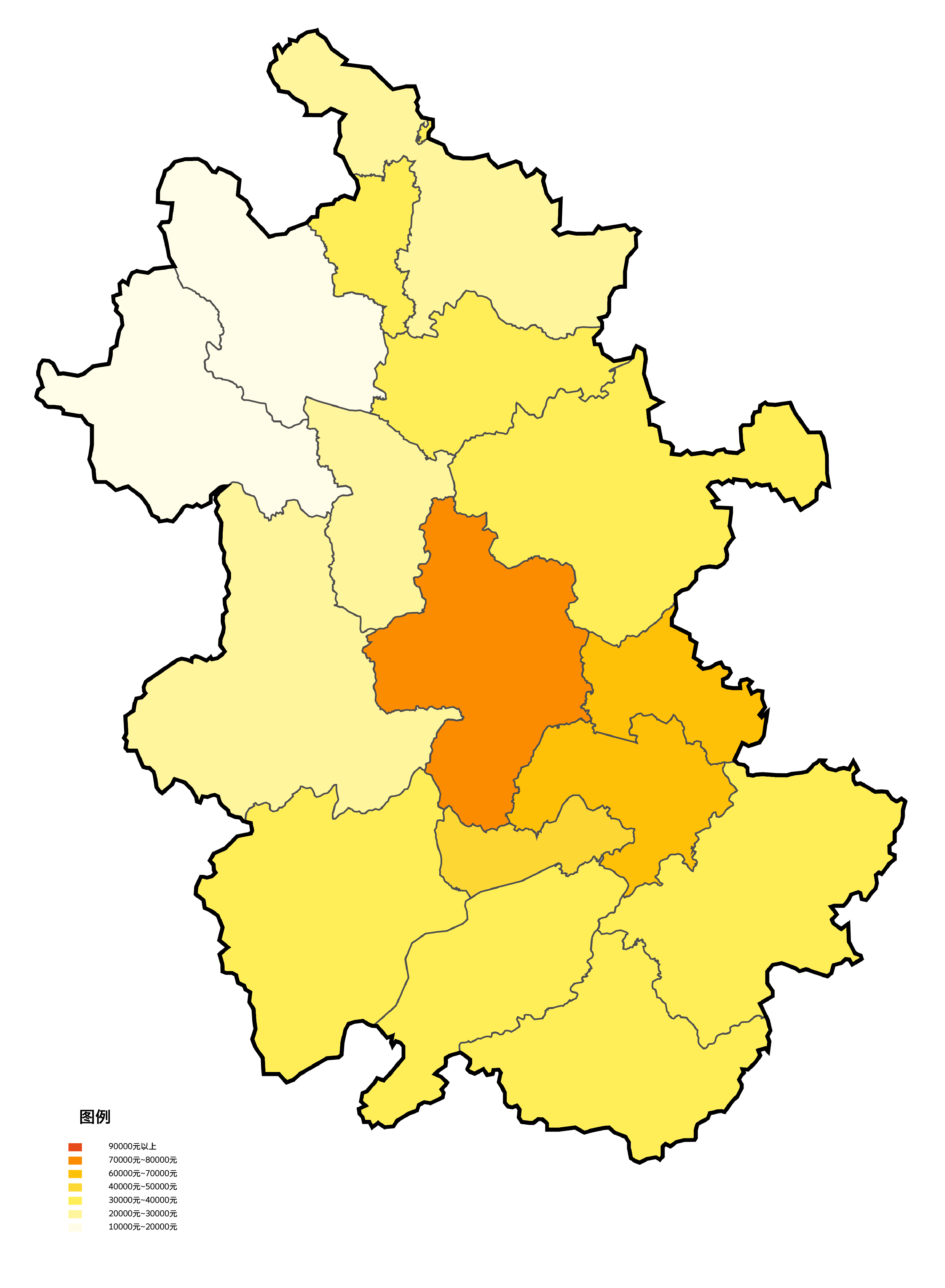 安徽省各地级市根据2015年人均地区生产总值填色地图